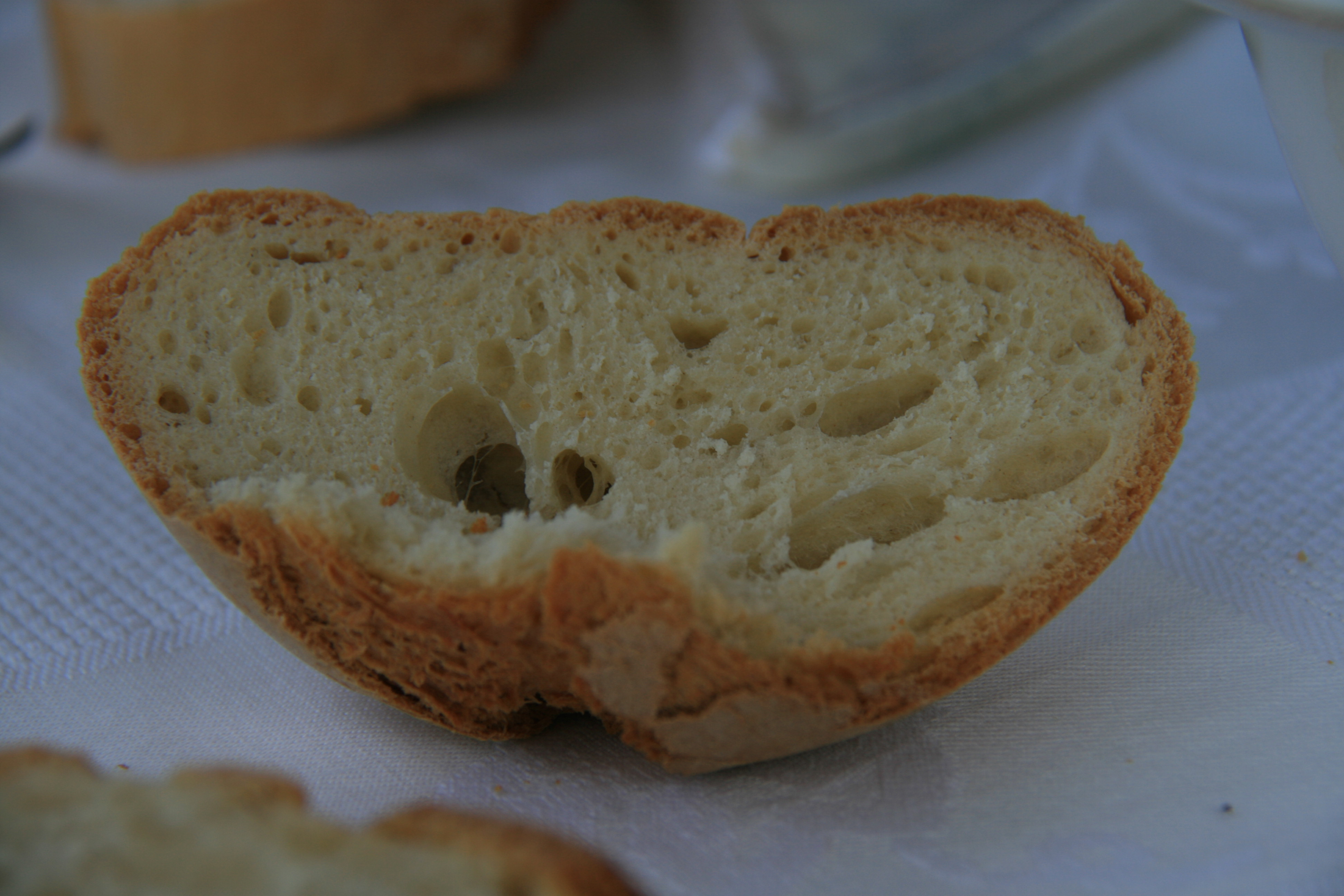 Pan de Aliste - Zamora